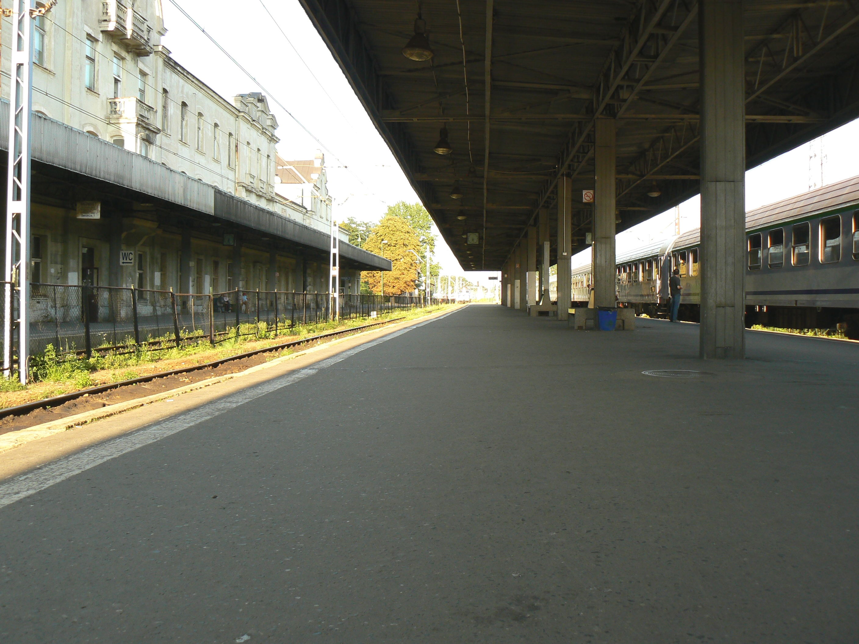 Peron na dworcu Łódź-Fabryczna - widok przed przebudową. Unknown